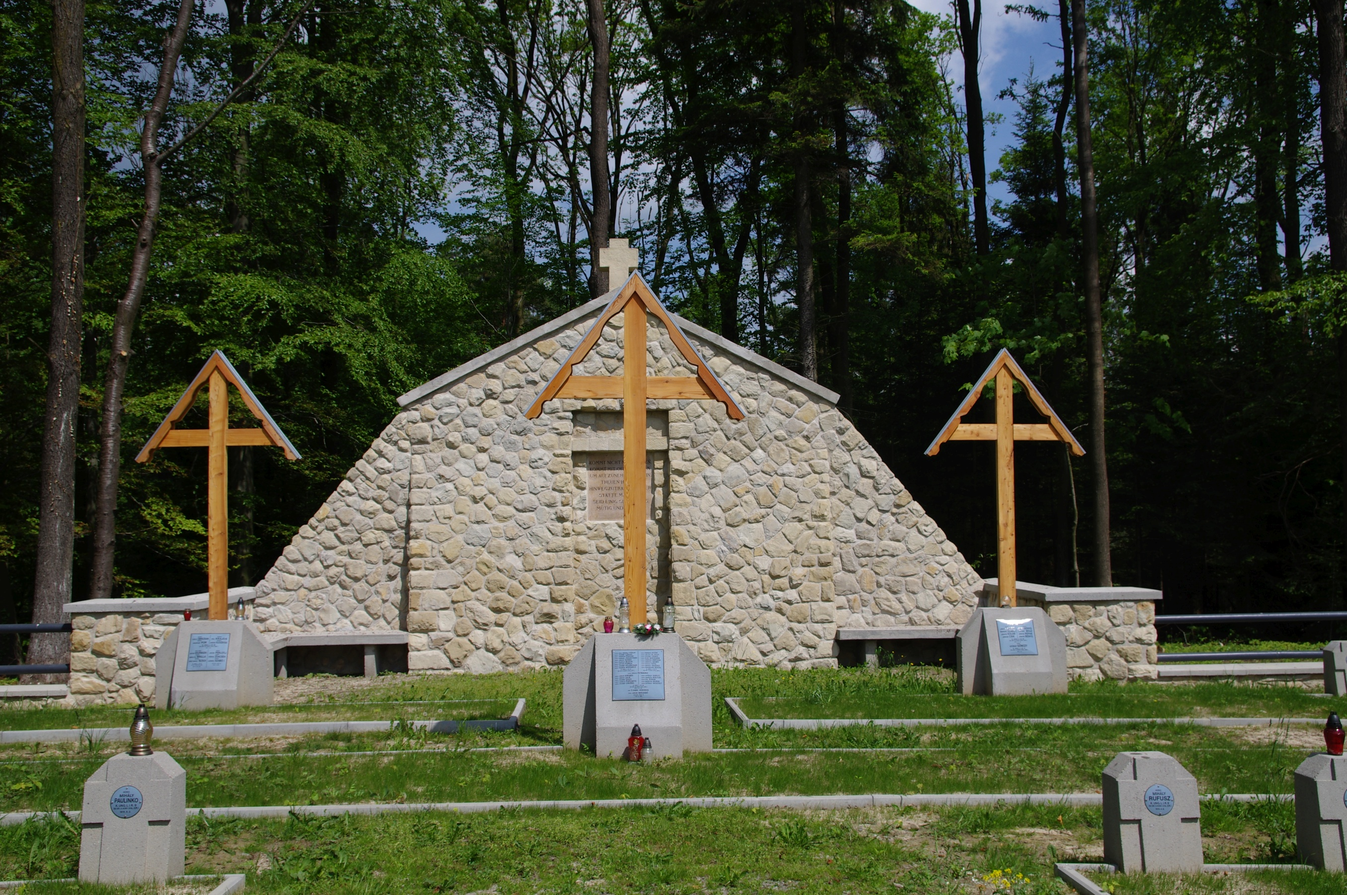 Cmentarz wojenny nr 121 Biesna